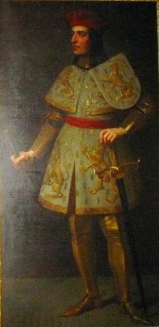 Othon 1er de Bourgogne - Fils de l'Empereur Allemand Barberousse - Peinture Cathédrale St Jean de Besançon